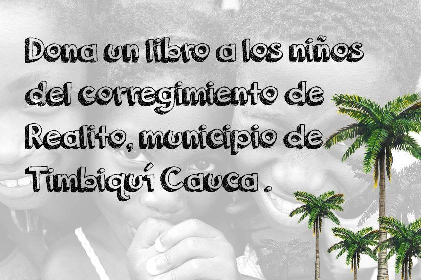 Una apuesta por derrotar la muerte mediante la alegria, la rebeldia, la libertad y la VIDA